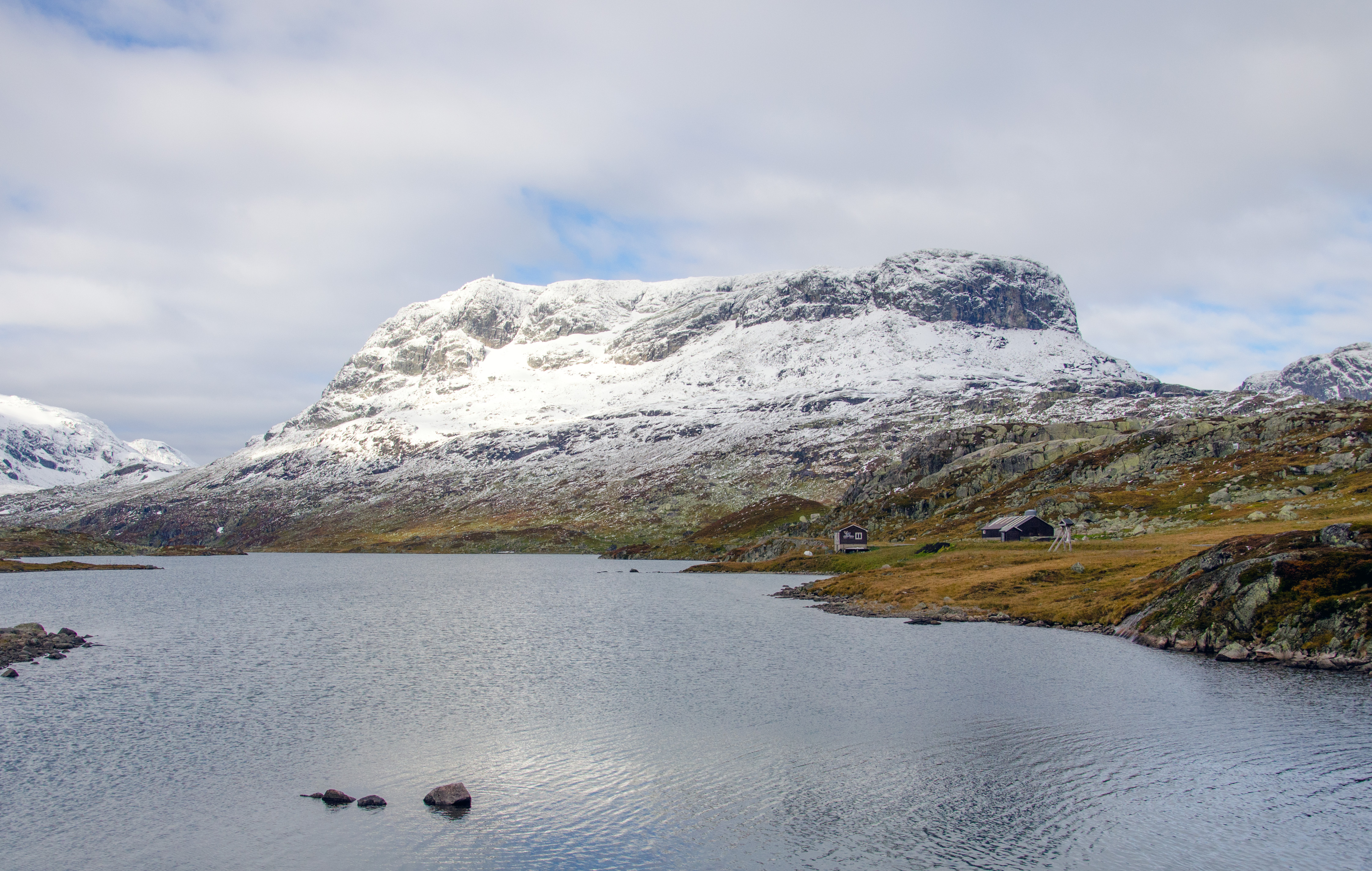 Verjesteinsnuten